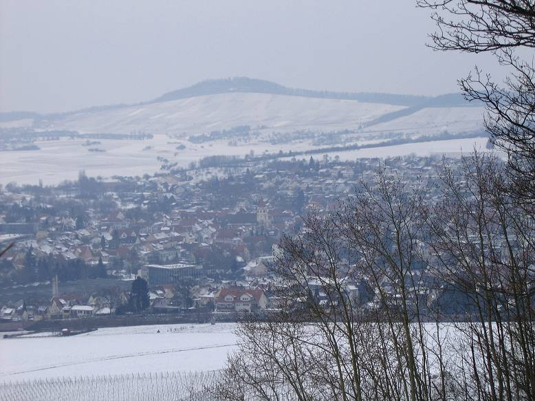 Großbottwar